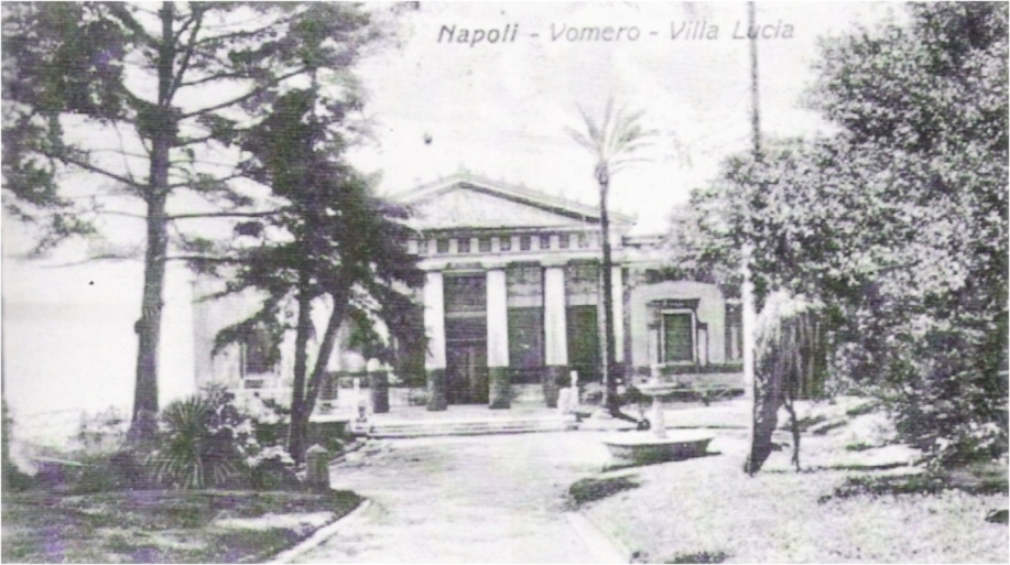 Villa Lucia nei primi anni del '900.